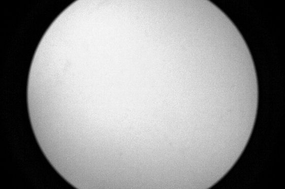 Bildkreis eines Sigma 18-200/3.5-6.3 DC Objektives (gerechnet für Sensoren im APS-C Format), der sichtbar wird, wenn das Objektiv an eine EOS 5D (Sensor im Kleinbildformat) angesetzt wird.